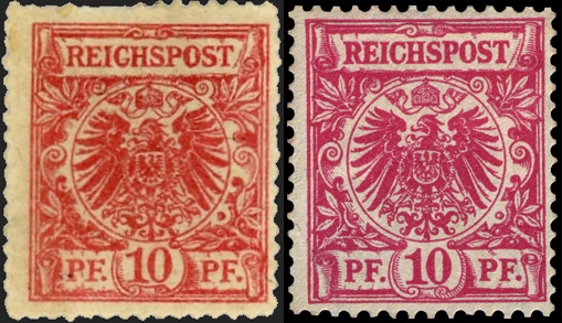 Vergleich der sogenannten "Höchster Postfälschung" von 1890 (Mi. Nr. 47 a Pfä1), links, mit einer echten Marke, rechts.